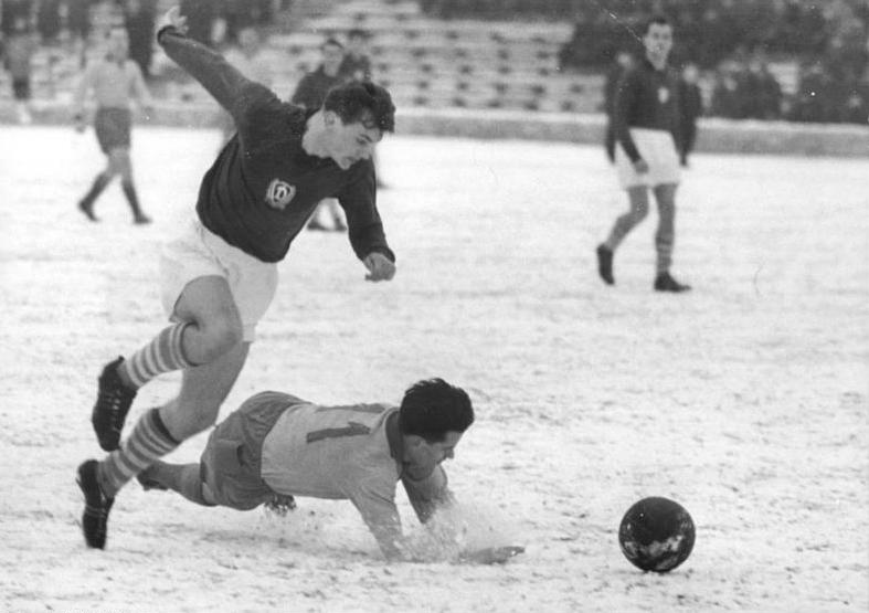 Zentralbild-Beyer Bey-Qu 23.3.1958 Vorwärts gewann Berliner Ortsderby im Fußball - Am Sonntag, dem 23.3.1958, standen sich im Berliner Jahn-Sportpark in einem Punktspiel der Fußball-Oberliga die Berliner Rivalen ASK Vorwärts und Dynamo gegenüber. Vizemeister Vorwärts gewann mit 2:1. UBz. Der Vorwärts-Stürmer Wirth ist gestürzt und damit ist eine große Chance verpasst. Links Skaba (Dynamo).